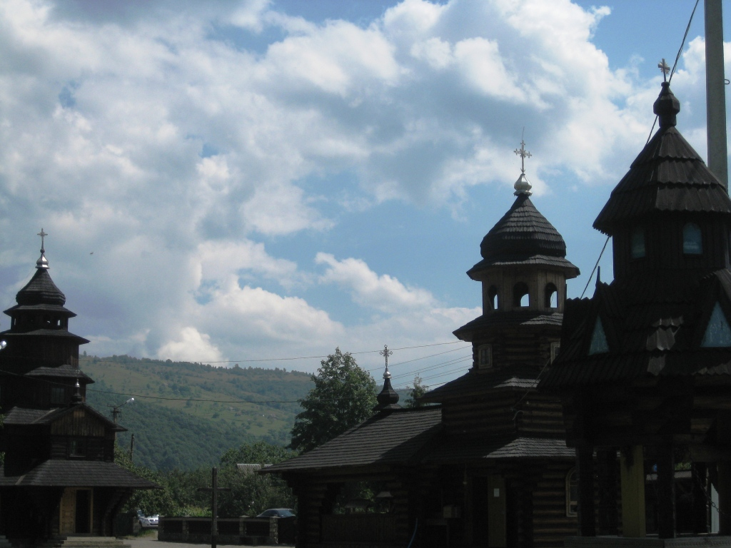 Дора